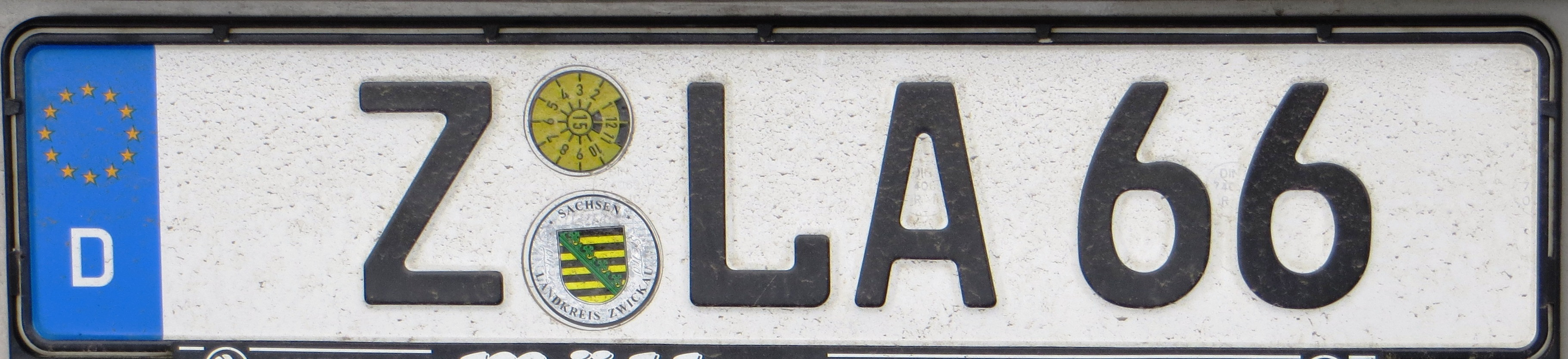 Zwickau plaat